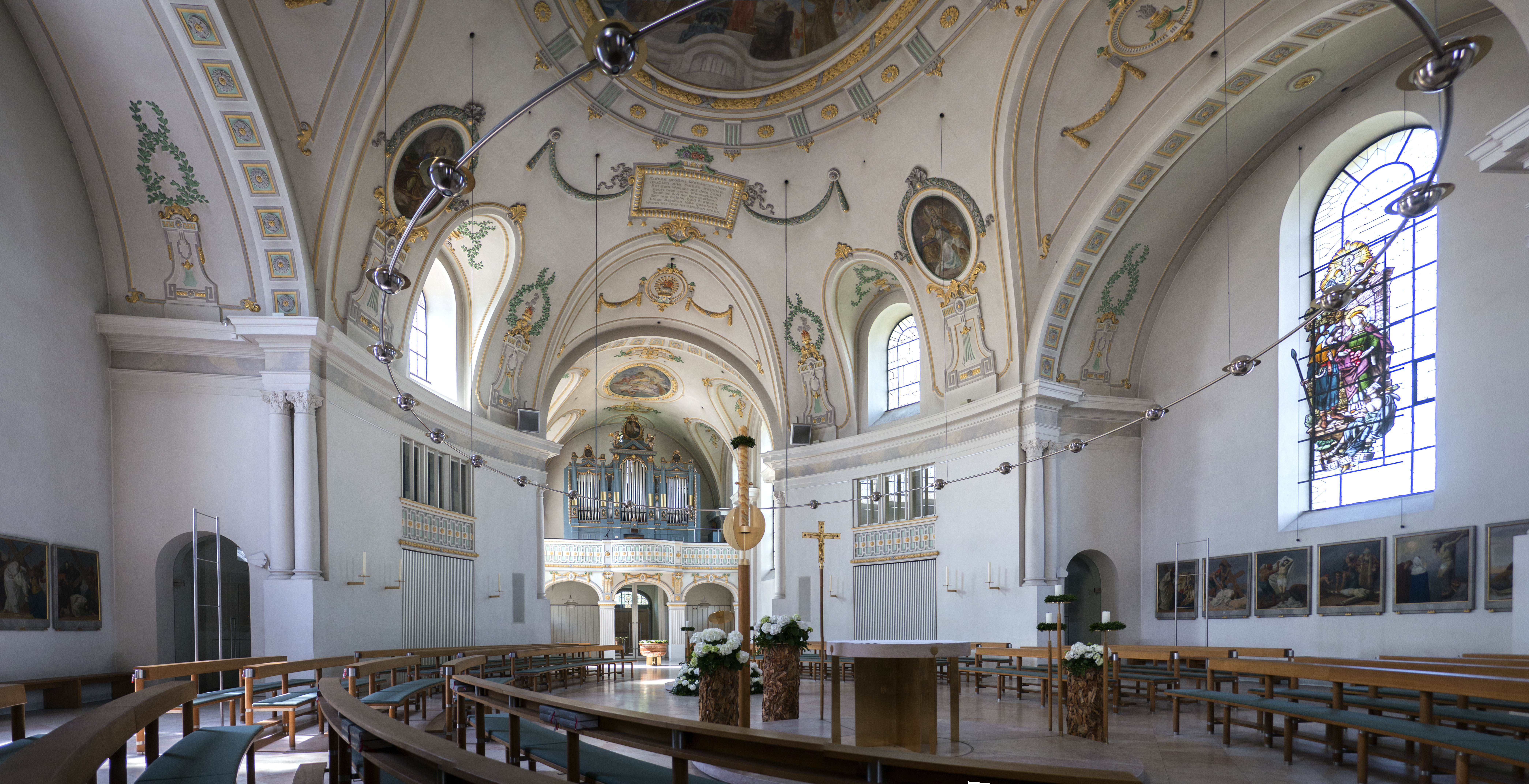 Pfarrkirche St. Anton innen, Passau